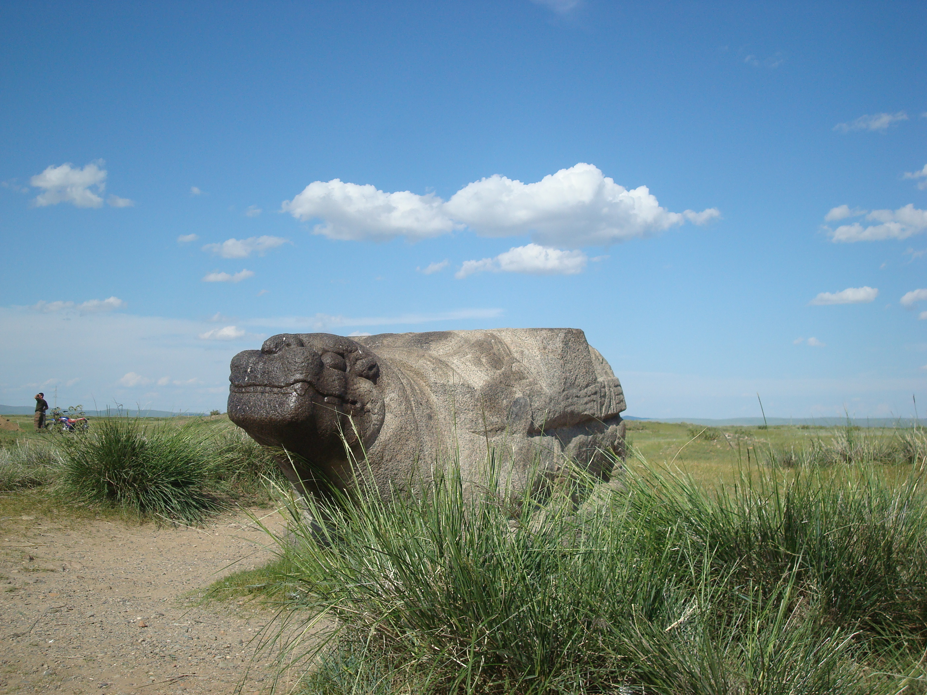 Erdene Dsuu